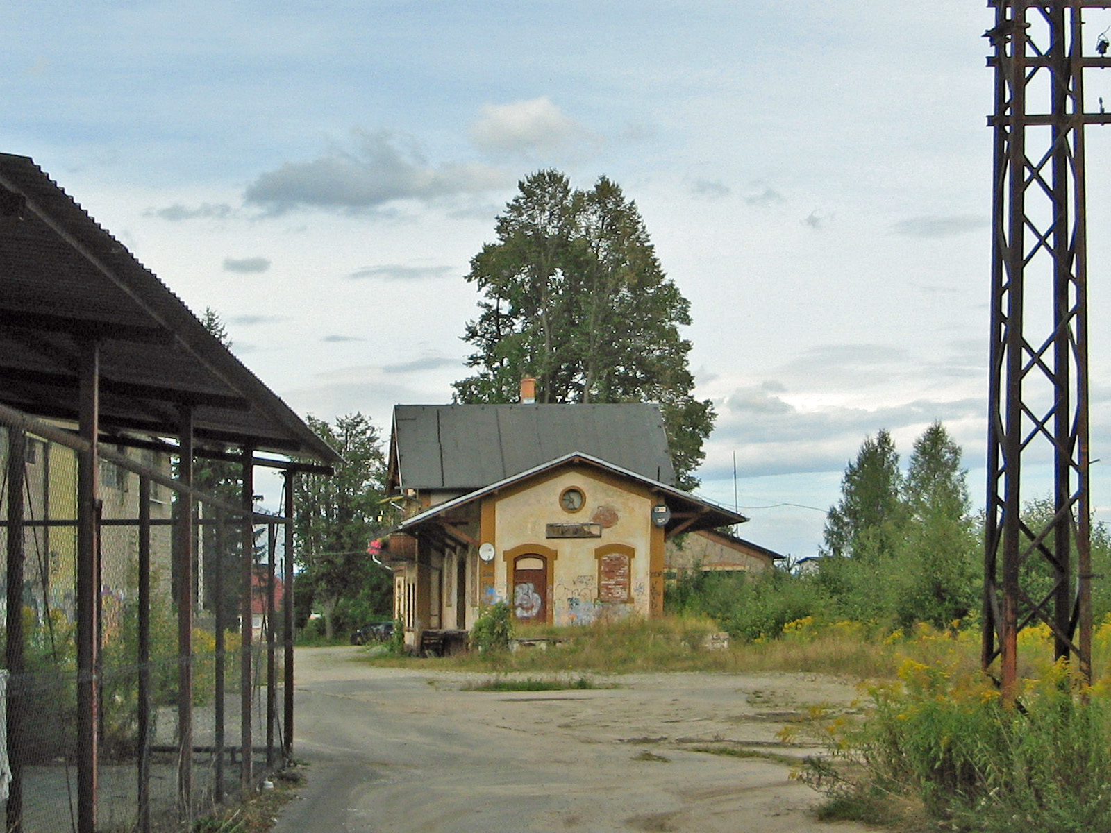 Stillgelegter Bahnhof der Riesengebirgsbahn in Miłków (ehemals Arnsdorf)